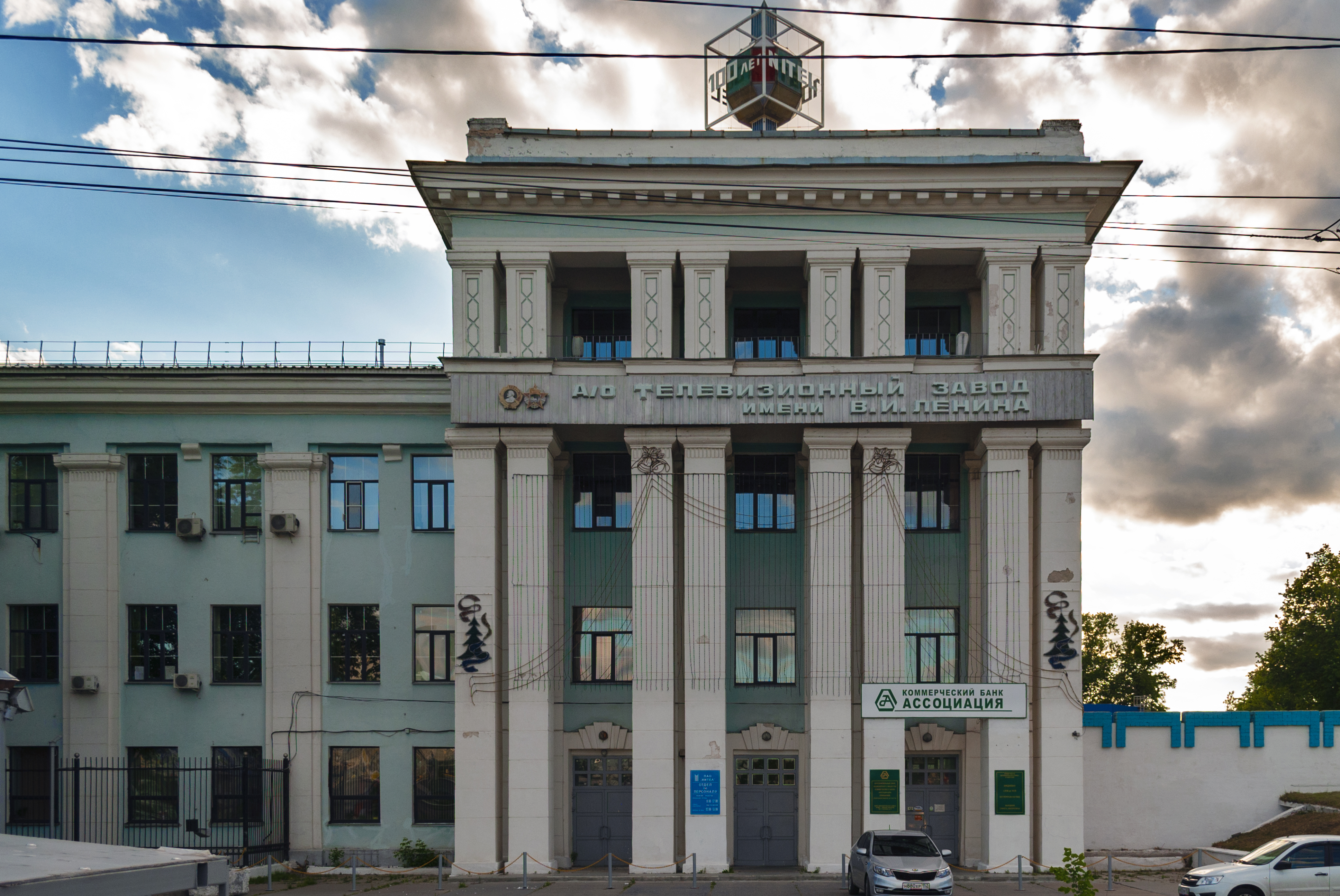 Телевизионный завод имени В. И. Ленина — НИТЕЛ